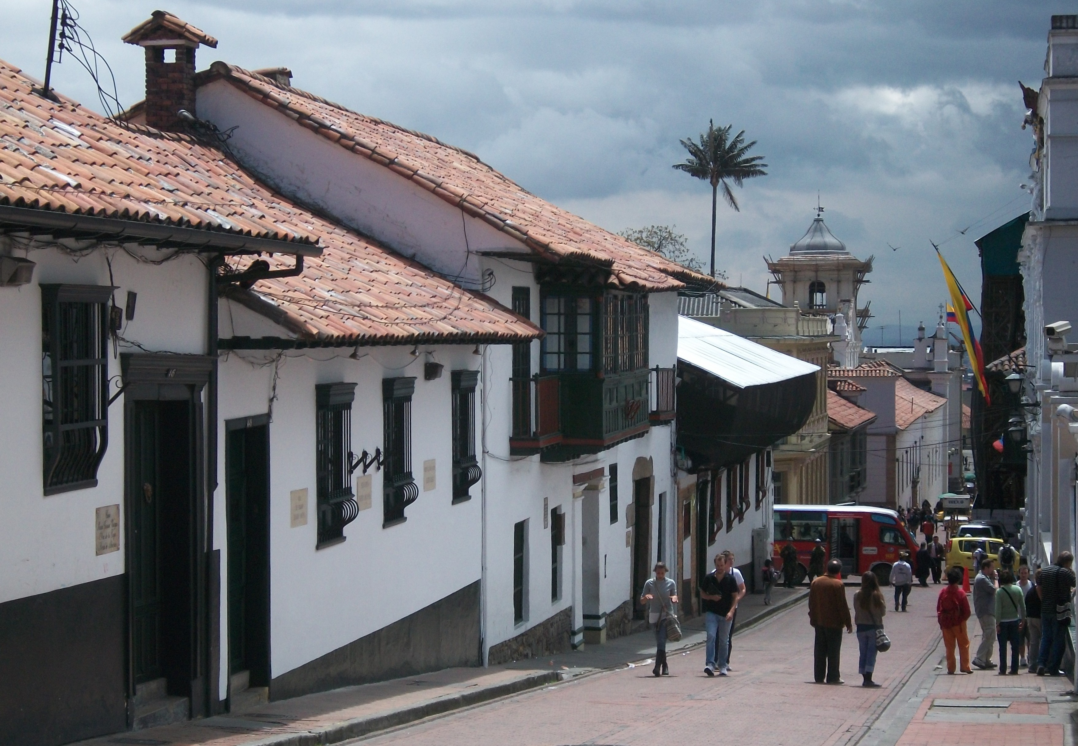 Carrera Cuarta con calle Décima, barrio La Candelaria